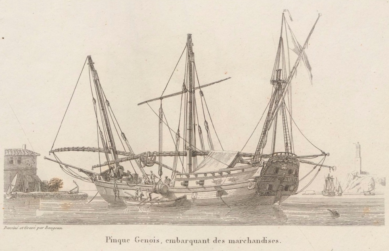 Gravure publiée en 1826 dans la Collection de toutes les espèces de bâtiments de guerre et de bâtiments marchands qui naviguent sur l'Océan et dans la Méditerranée, dessinée d'après nature et gravée par Baugean, mais réalisée avant 1819 (date de la mort de l'auteur).